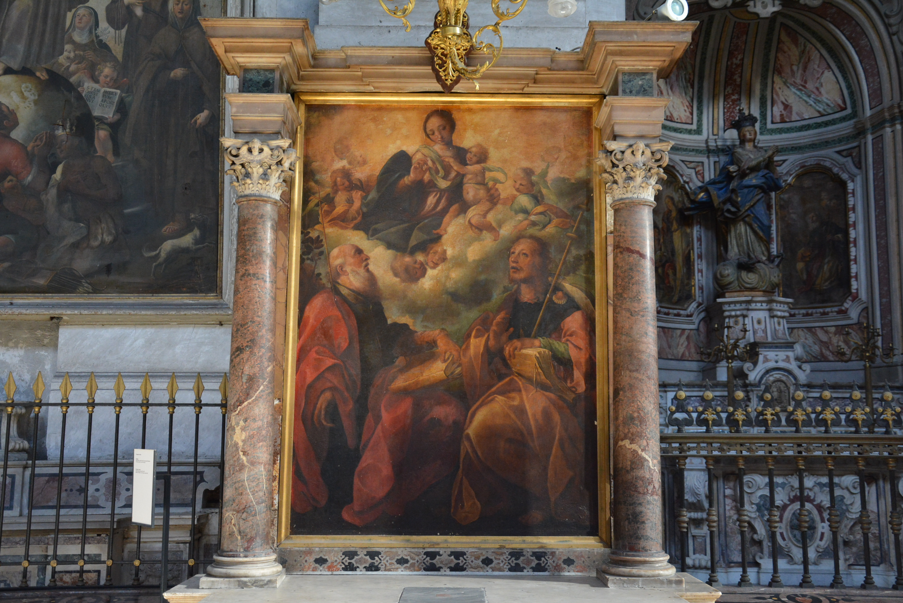 Chiesa di Santa Maria la Nova a Napoli